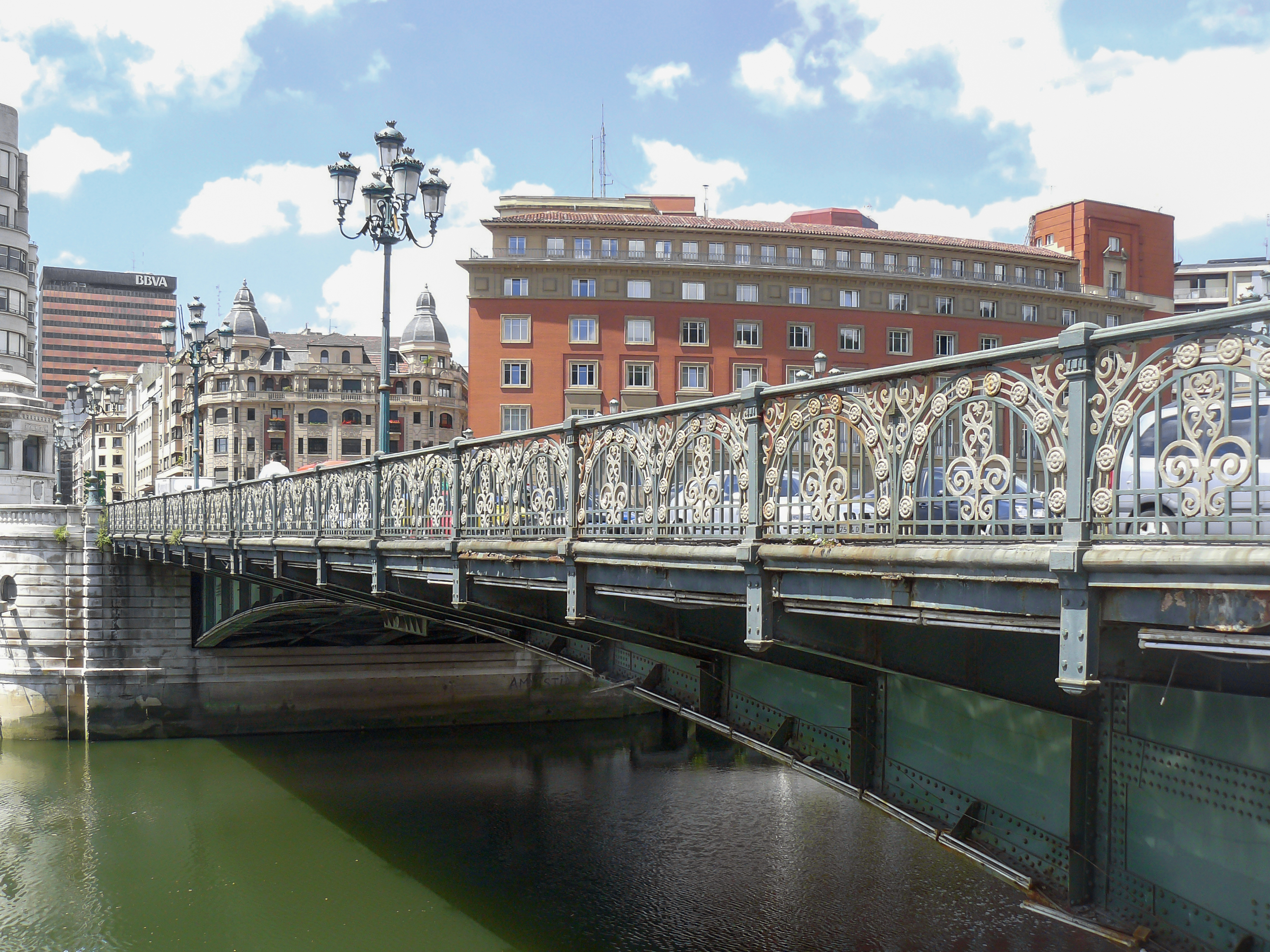 Puente del Ayuntamiento, en Bilbao, España.